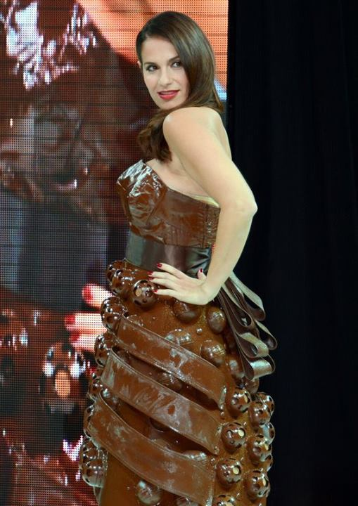 Elisa Tovati au défilé de mode du salon du chocolat.